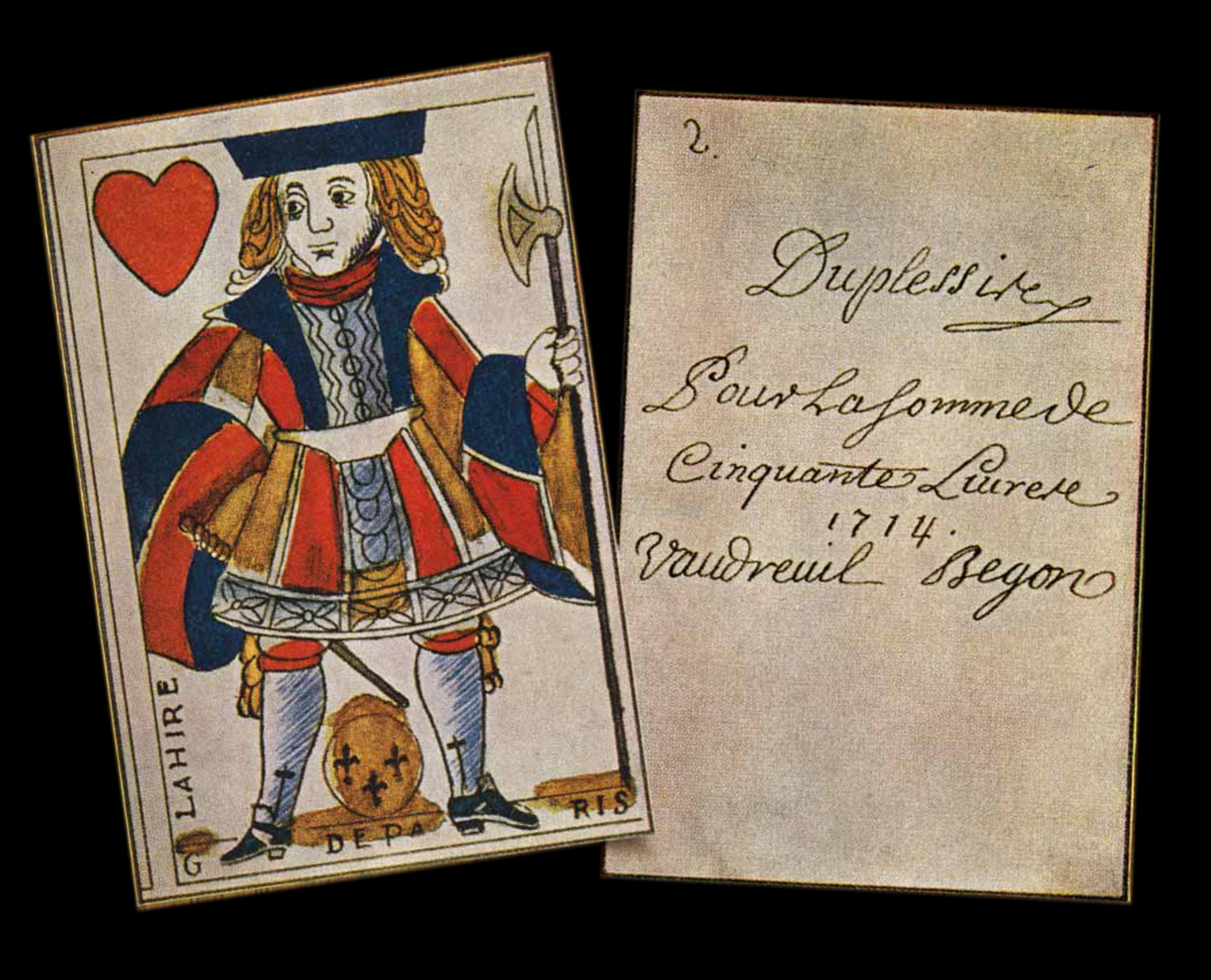 1714, Carte à jouer ayant une valeur de monnaie dans la colonie du Canada, utilisée lorsque la monnaie métallique vient à manquer. Crédit: COLLECTION NATIONALE DE MONNAIES, MUSÉE DE LA BANQUE DU CANADA